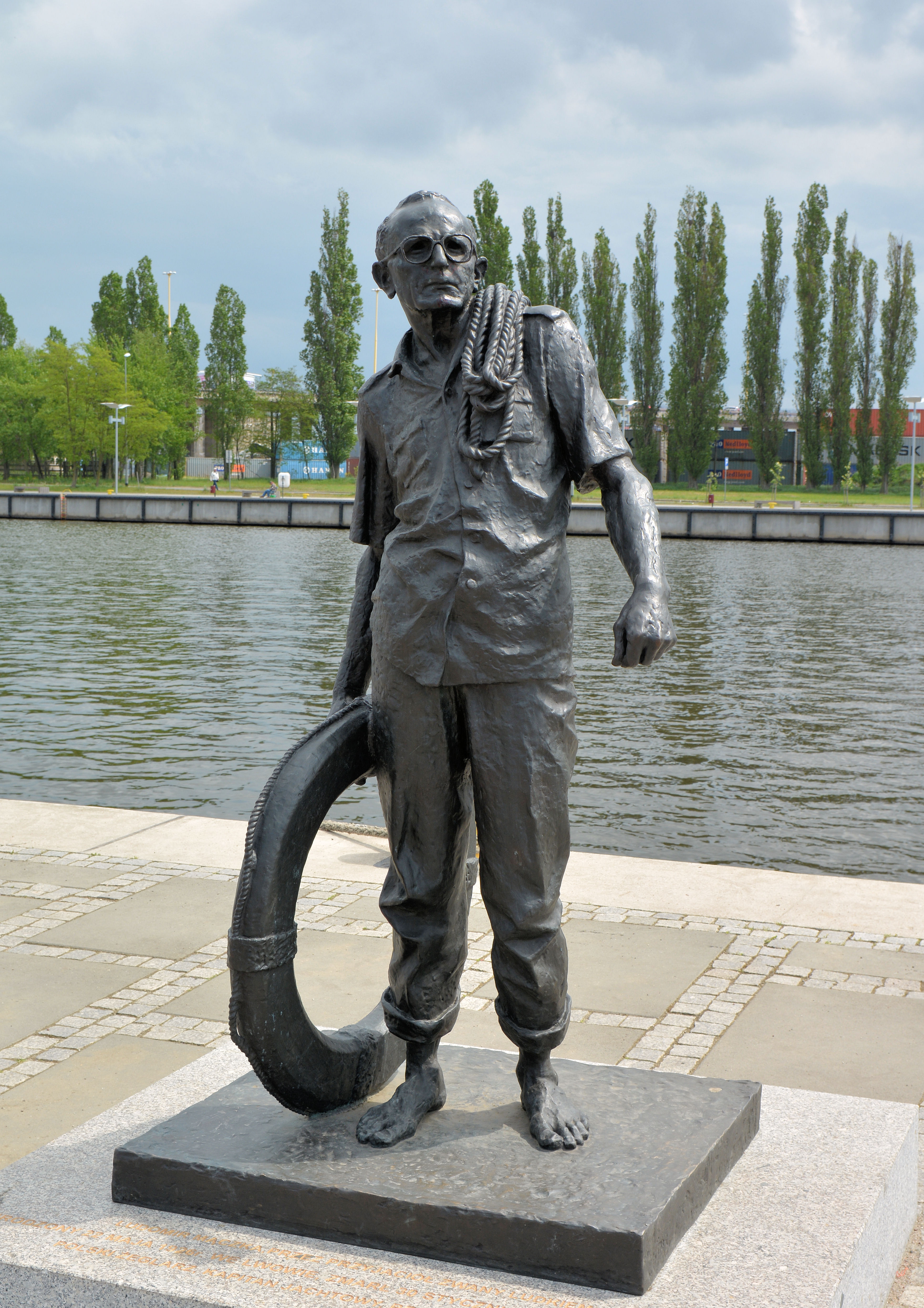 Pomnik Ludomira Mączki na Bulwarze Piastowskim w Szczecinie